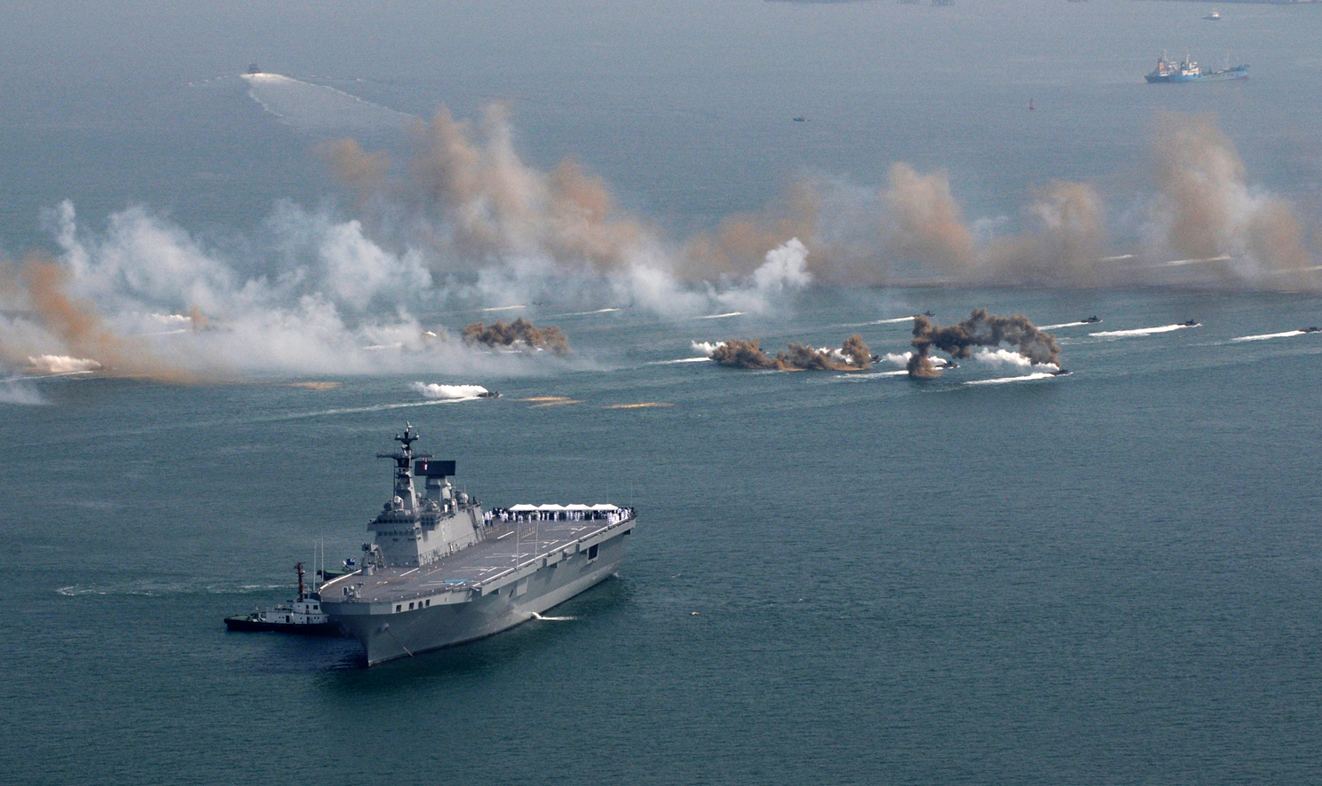 본 사진은 해군에서 촬영한 사진입니다